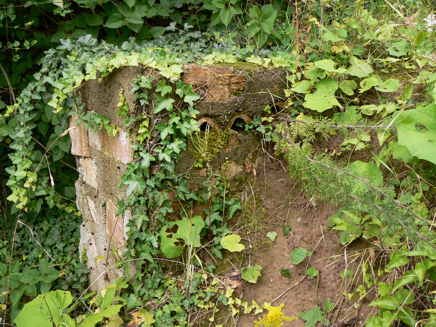 Baureste auf dem Brachgelände mit den Bodenresten der Villa Rustica Kempten, möglicherweise bei der Ausgrabung freigelegte Reste der Römervilla und mit Mörtel gesichert.